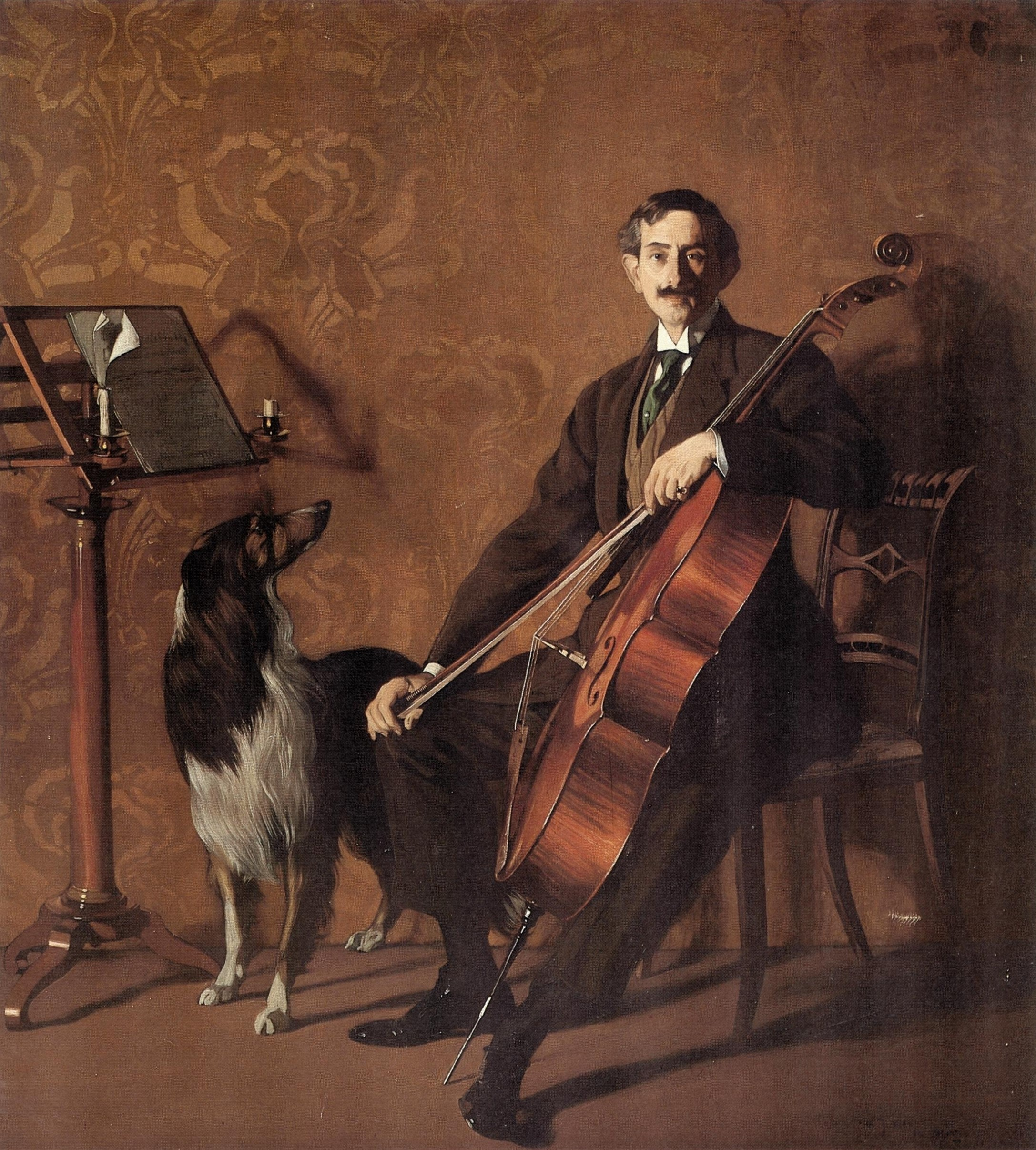 El violonchelista Juan de Azurmendi, retrato de Ignacio Zuloaga (1909)